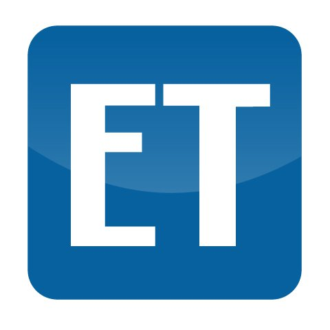 El Tiempo, diario colombiano.